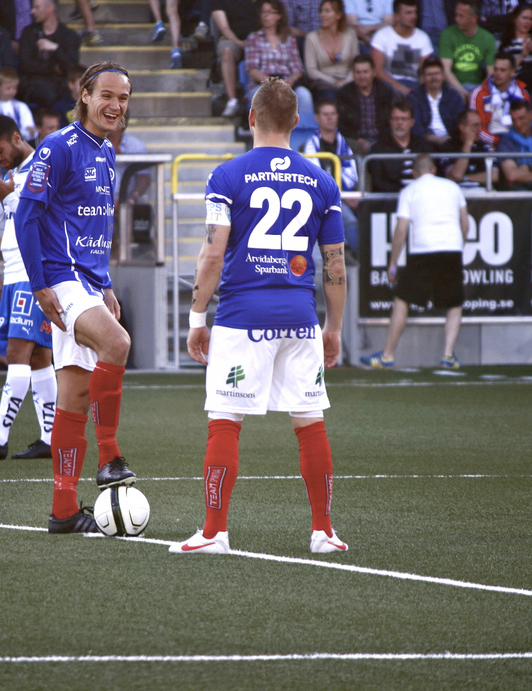 Åtvidabergs FF:s Viktor Prodell i samtal med Magnus Eriksson under östgötaderbyt 2012 mellan IFK Norrköping och Åtvidabergs FF på Nya Parken. Bilden tagen med en Canon EOS 1000D plus telelinsen 55-250mm